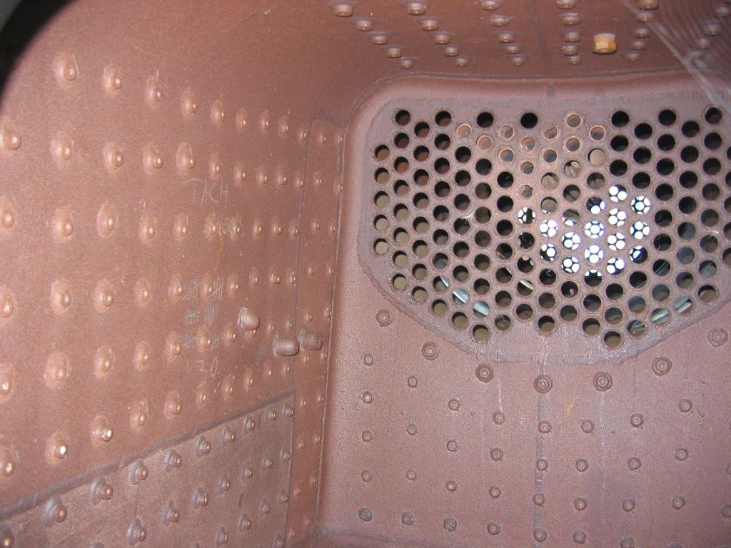 Lokomotivdampfkessel der Harzer Schmalsurbahn (entrohrt)